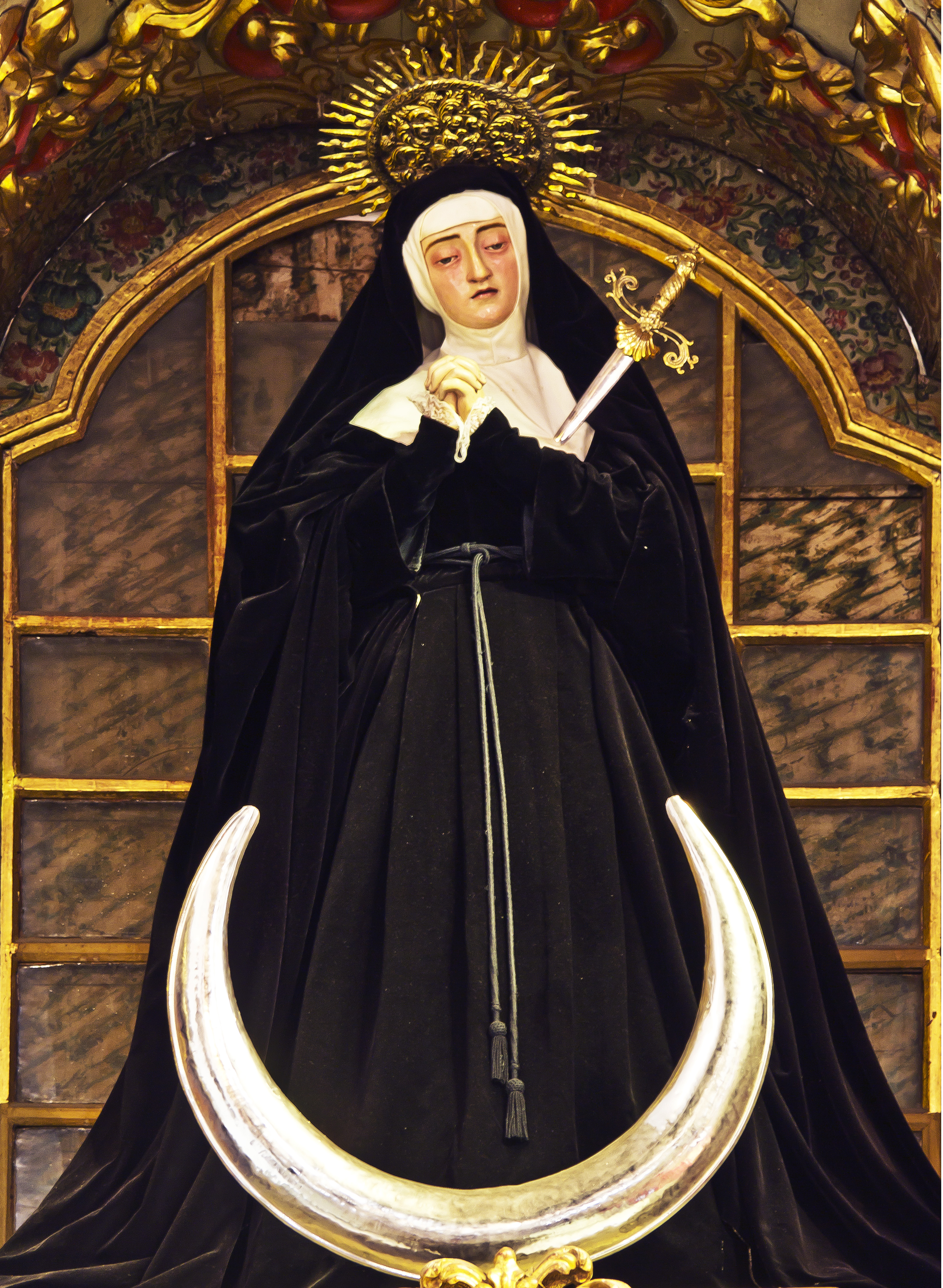 Virgen de los Dolores o del Retiro en la iglesia de San Francisco en Santa Cruz de Tenerife